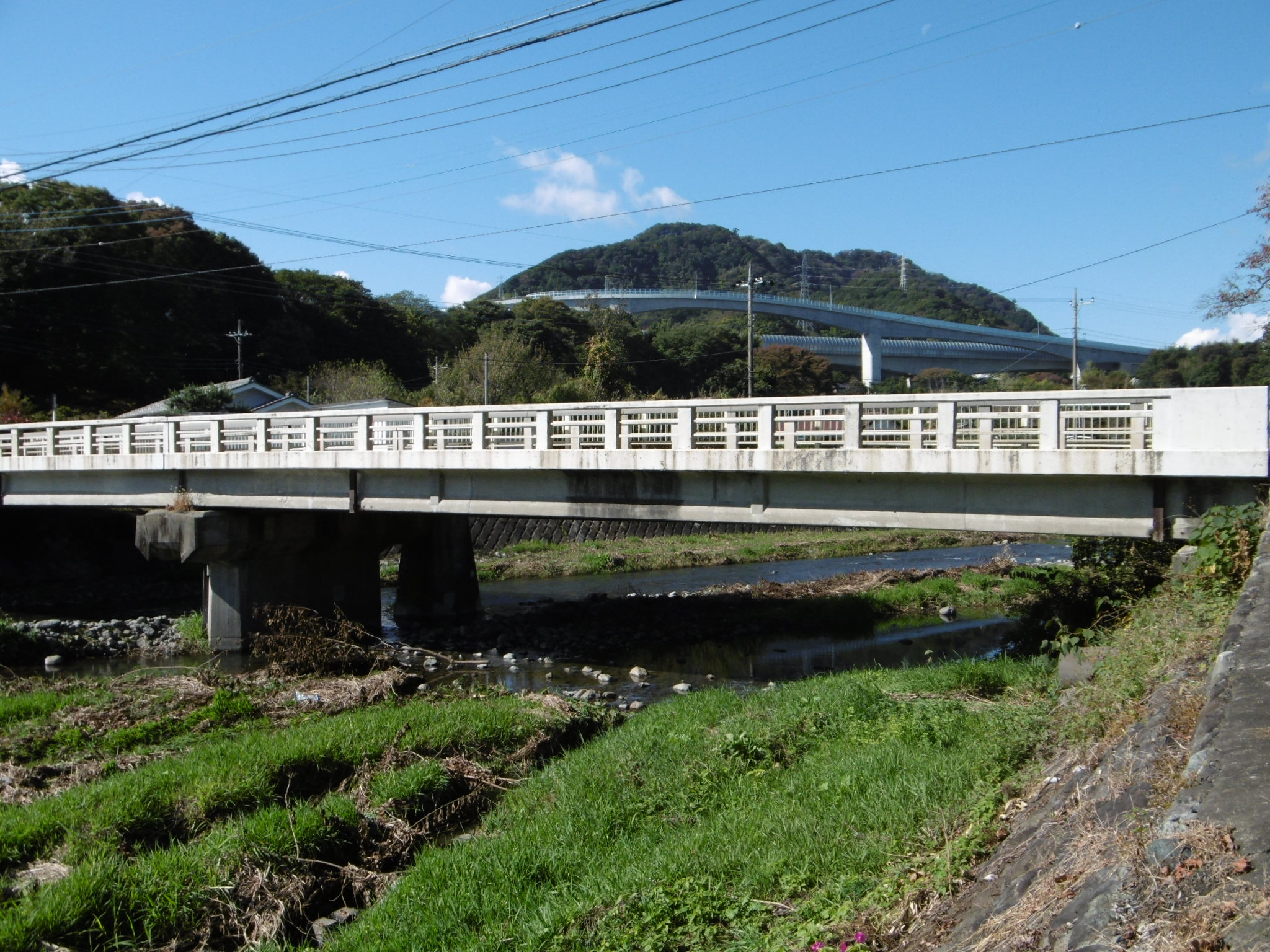 神奈川県相模原市緑区に流れる下の串川が相模川と合流する付近に、小倉地区から起点の太井上依知線がこの川の上の河原橋を通る風景。その橋の山奥に見える道路は首都圏中央連絡自動車道